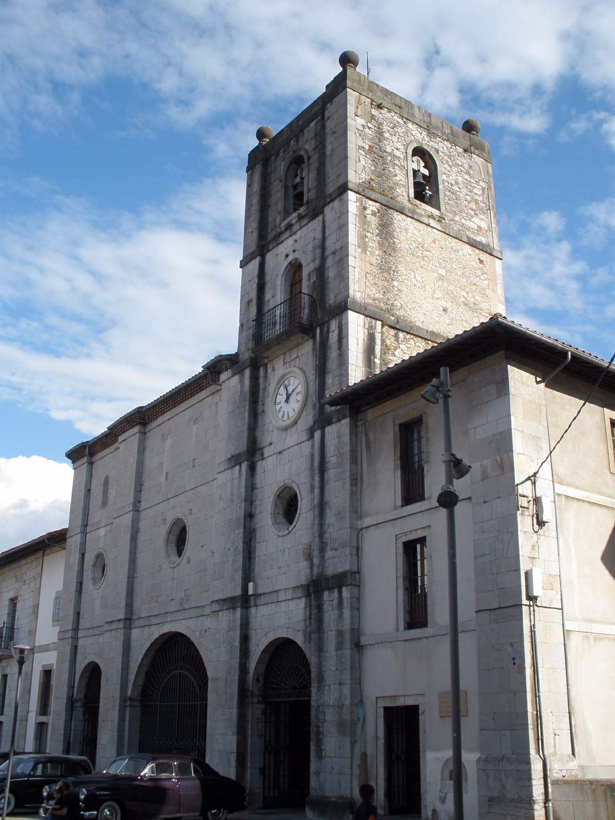 Iglesia de Santa María la Mayor (Pravia, Asturias)